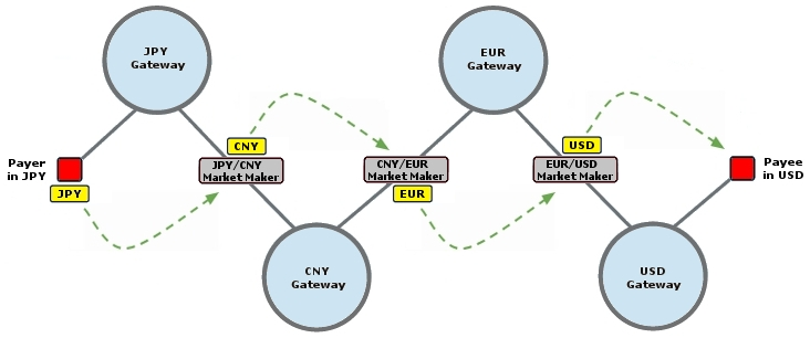 リップルのパスファインディング・アルゴリズム